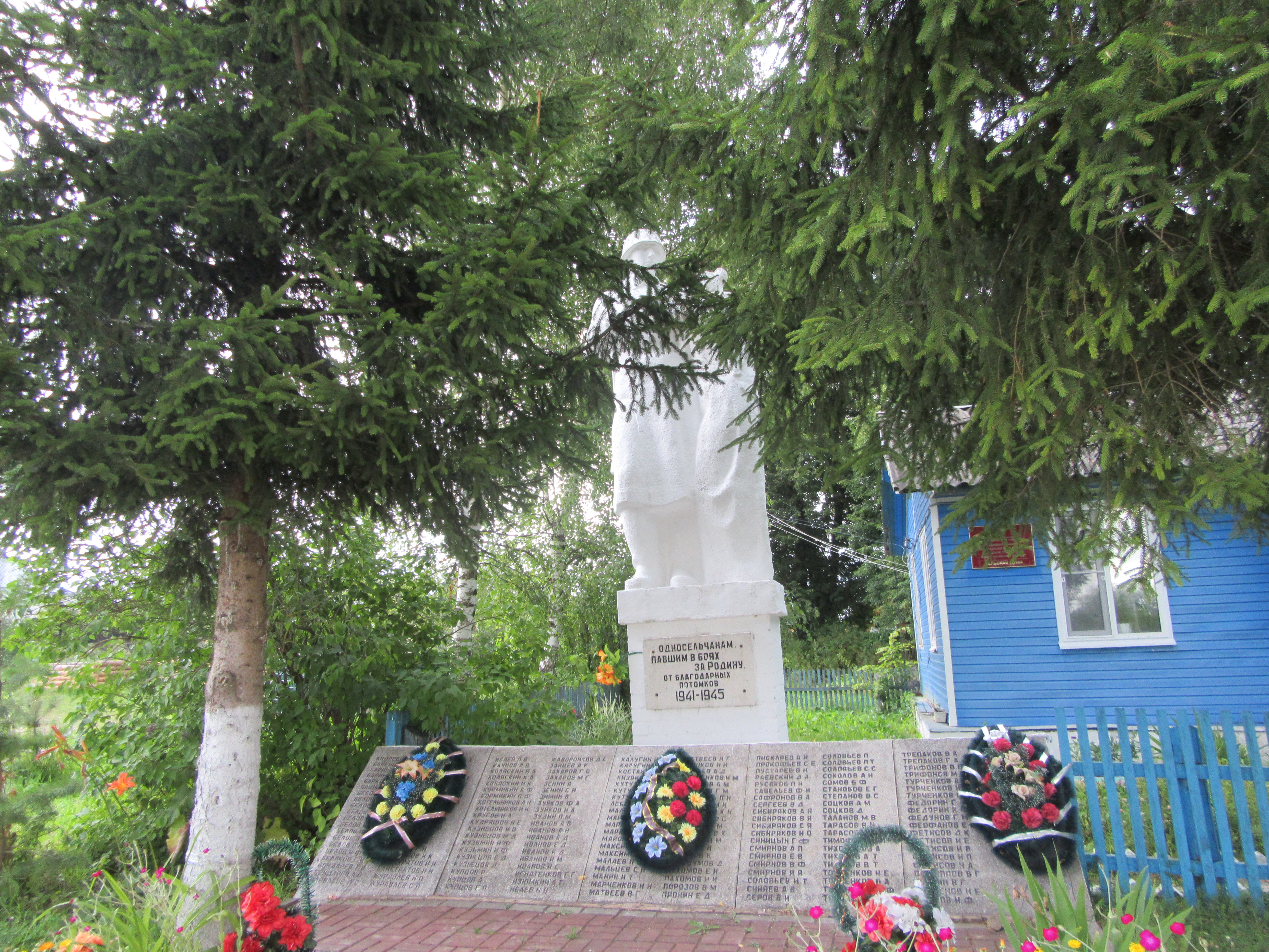 Памятник у администрации села Шанский Завод